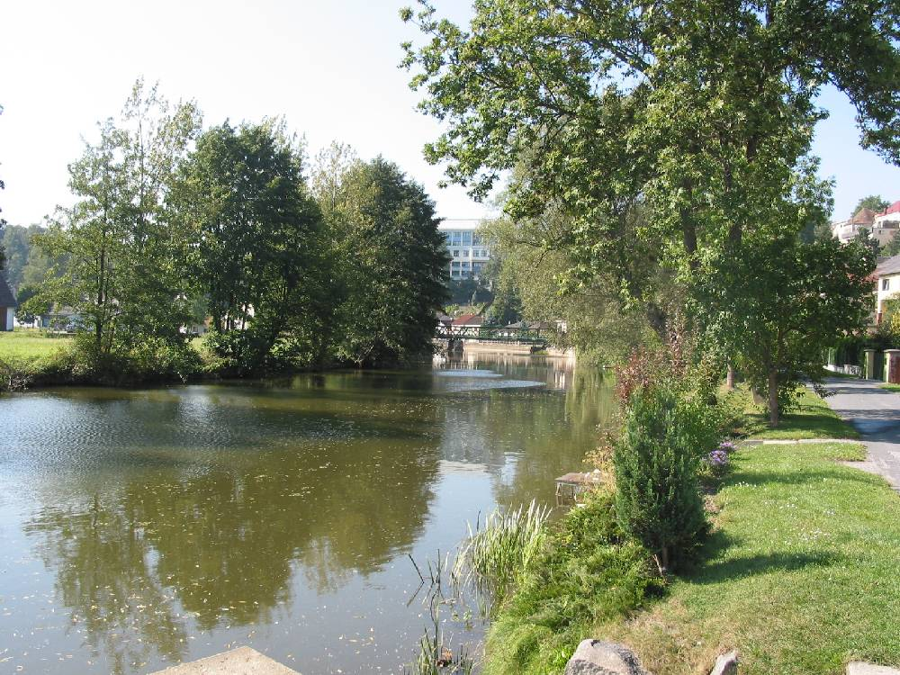 German Thaya in Waidhofen an der Thaya 27.9.2005 Quelle: Eigenes Foto